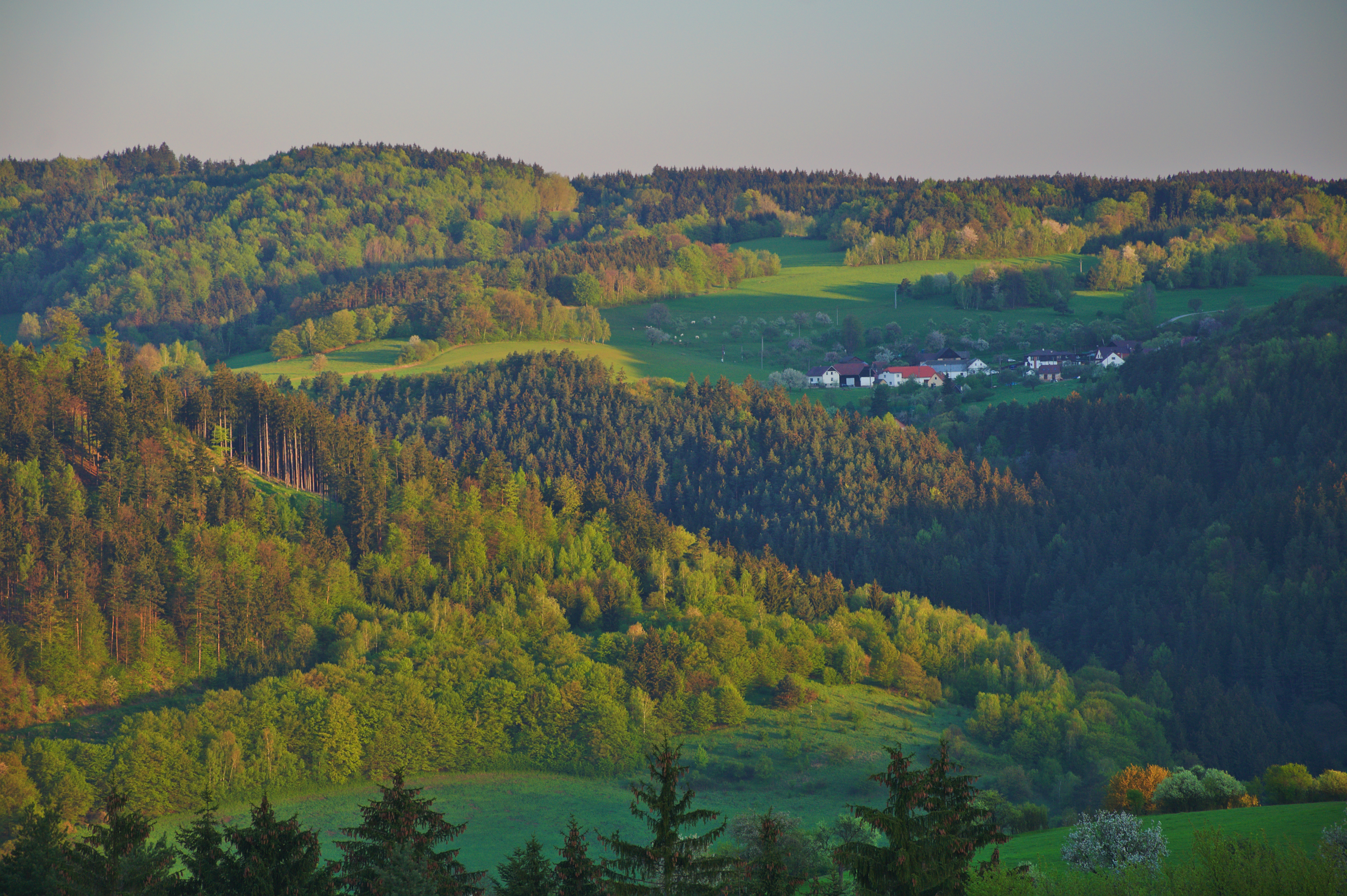 Pohled na Vrtěžíř z Kopicova vrchu, Štěpánov nad Svratkou, okres Žďár nad Sázavou